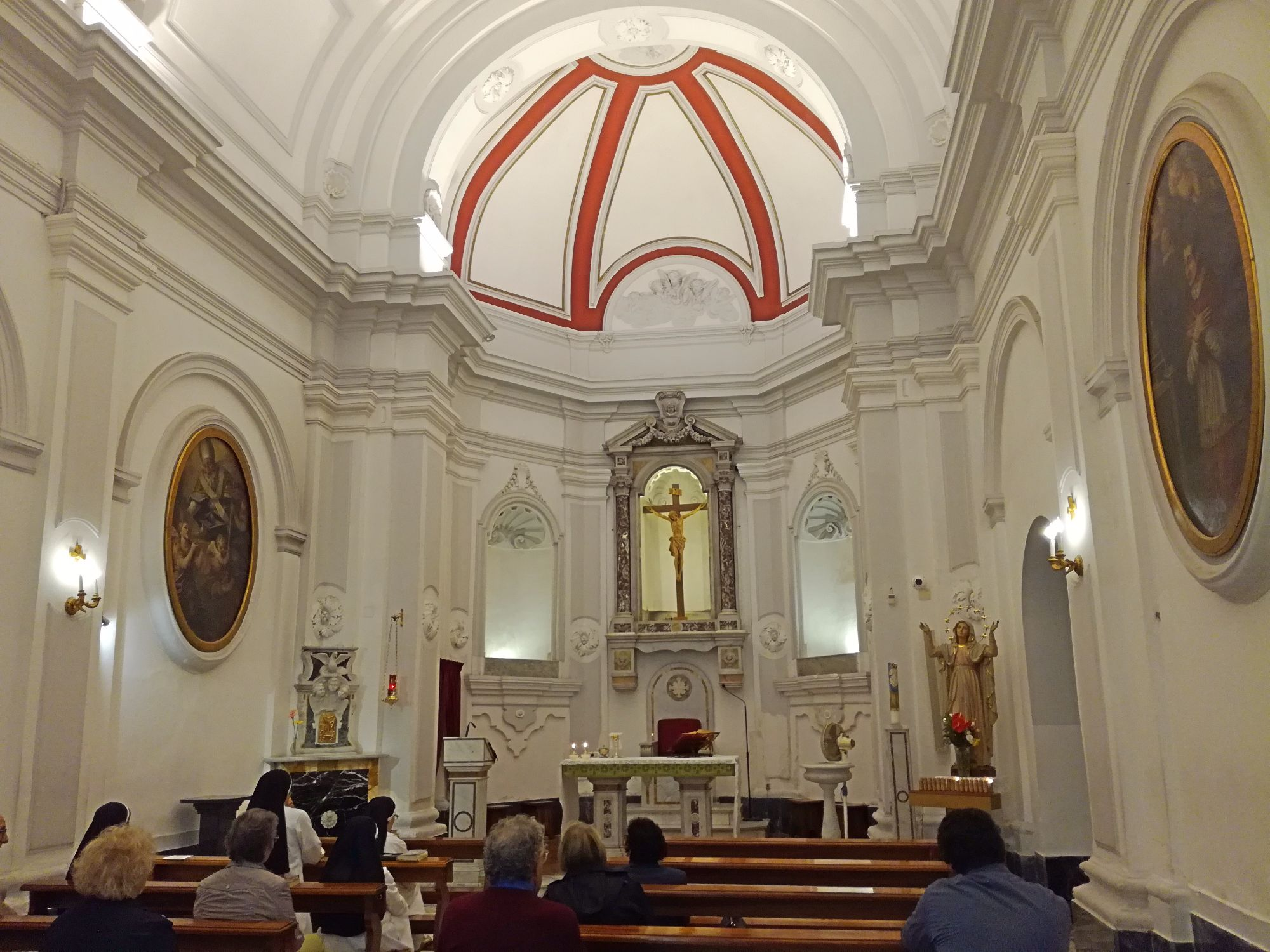 Santa Maria Solitaria a Cavalleggeri (Napoli)